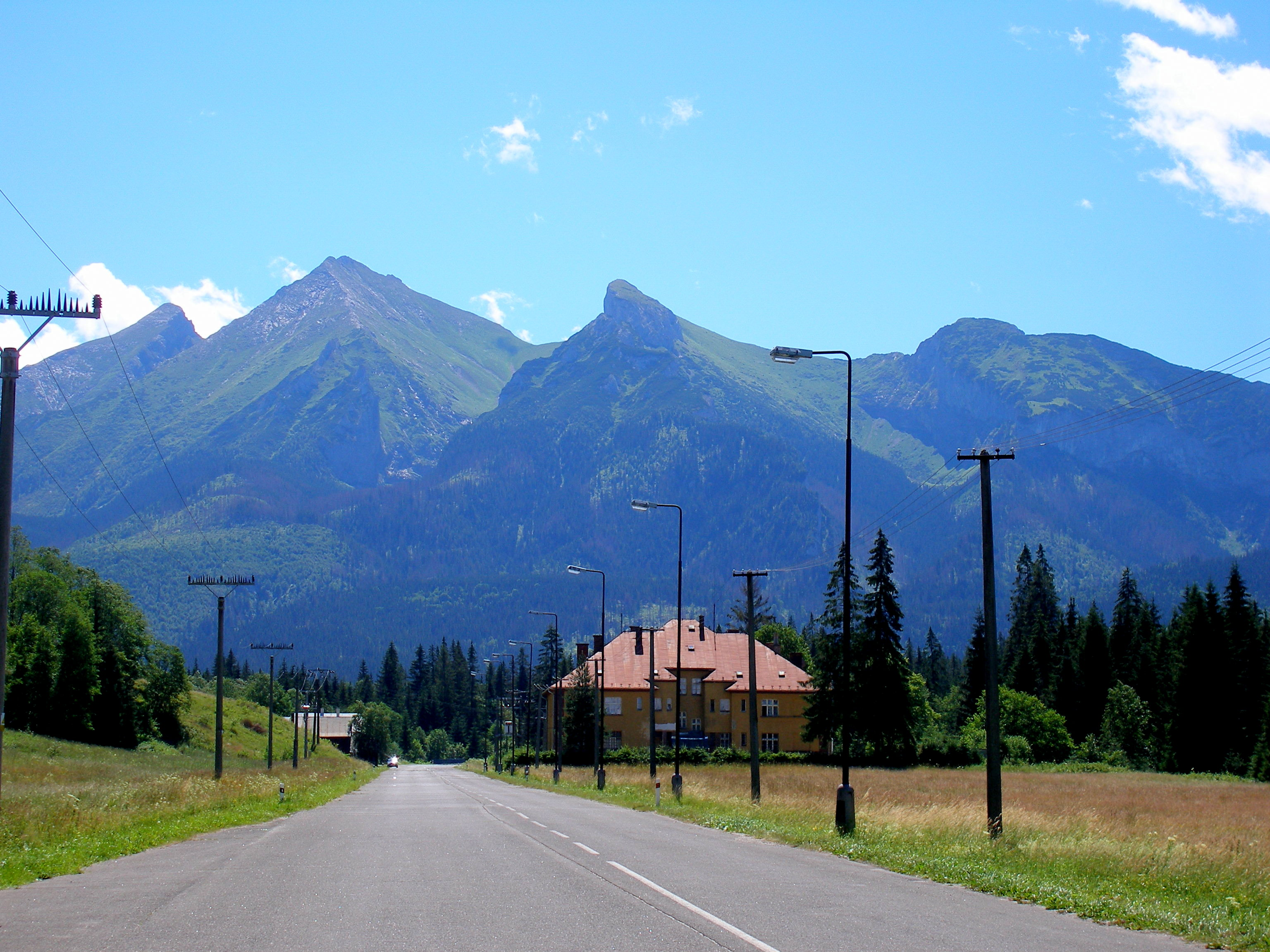 Podtatranská obec Podspády a okolie, na štátnej hranici s Poľskom.